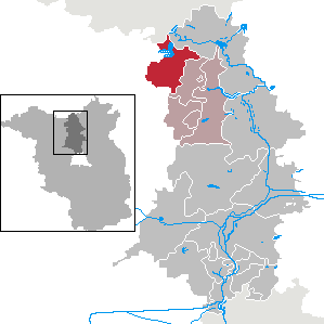 Stechlin in Brandenburg (Country) - District Oberhavel